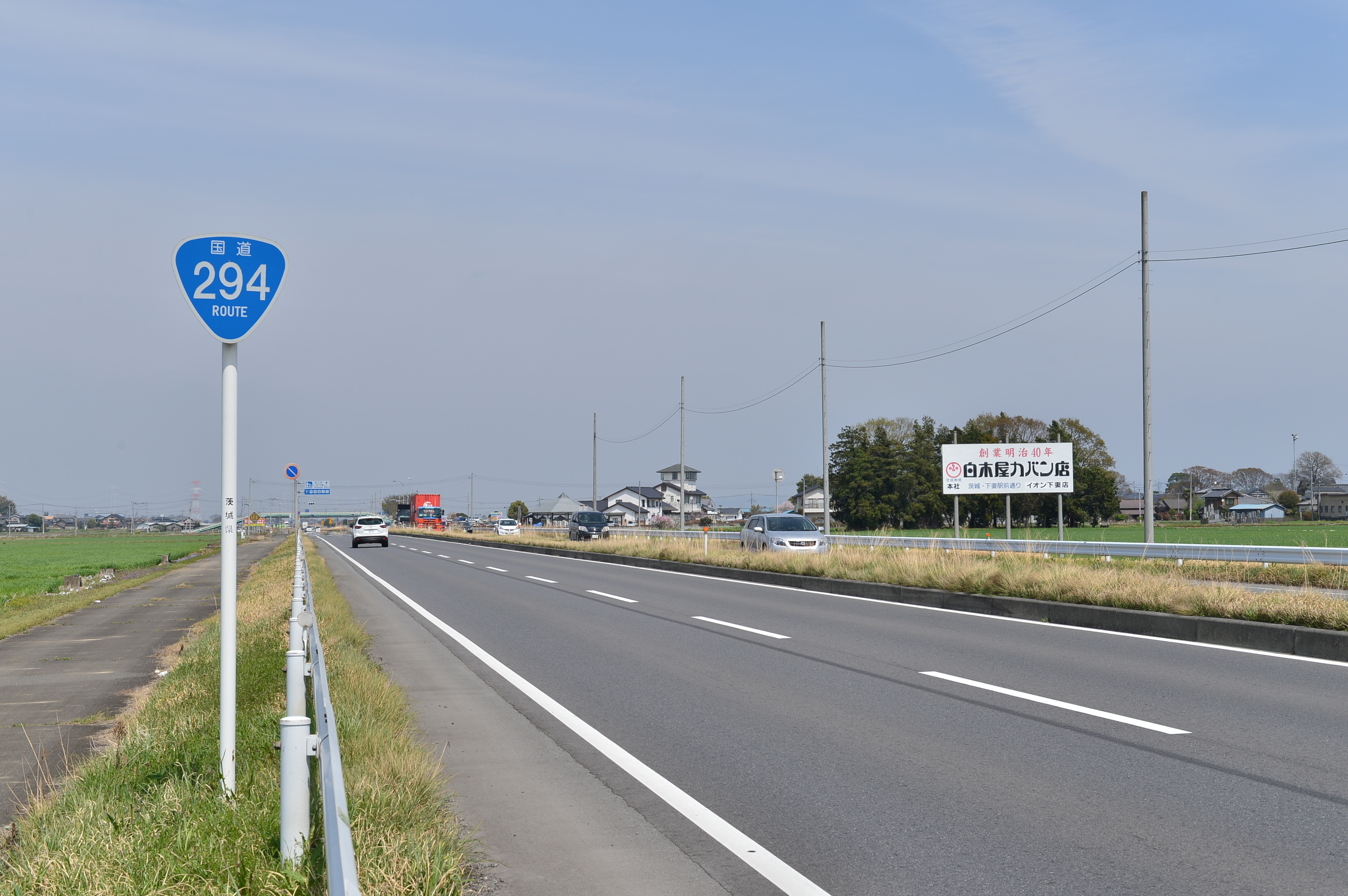 国道294号常総バイパス（茨城県下妻市）。道の駅しもつま付近にて。筑西市方面に向け撮影。